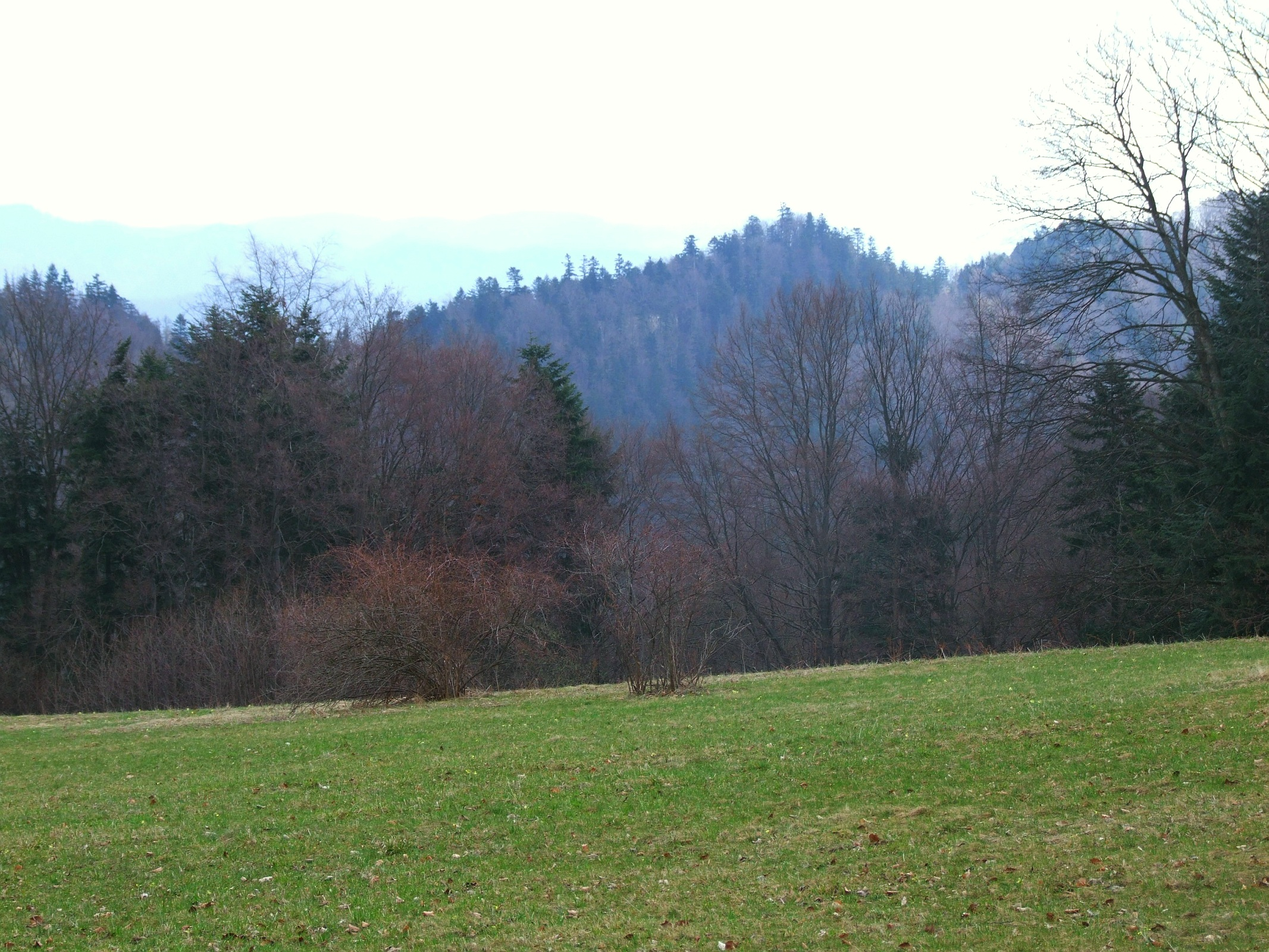 Widok z polany Wyrobek w Pieninach na Pieninki